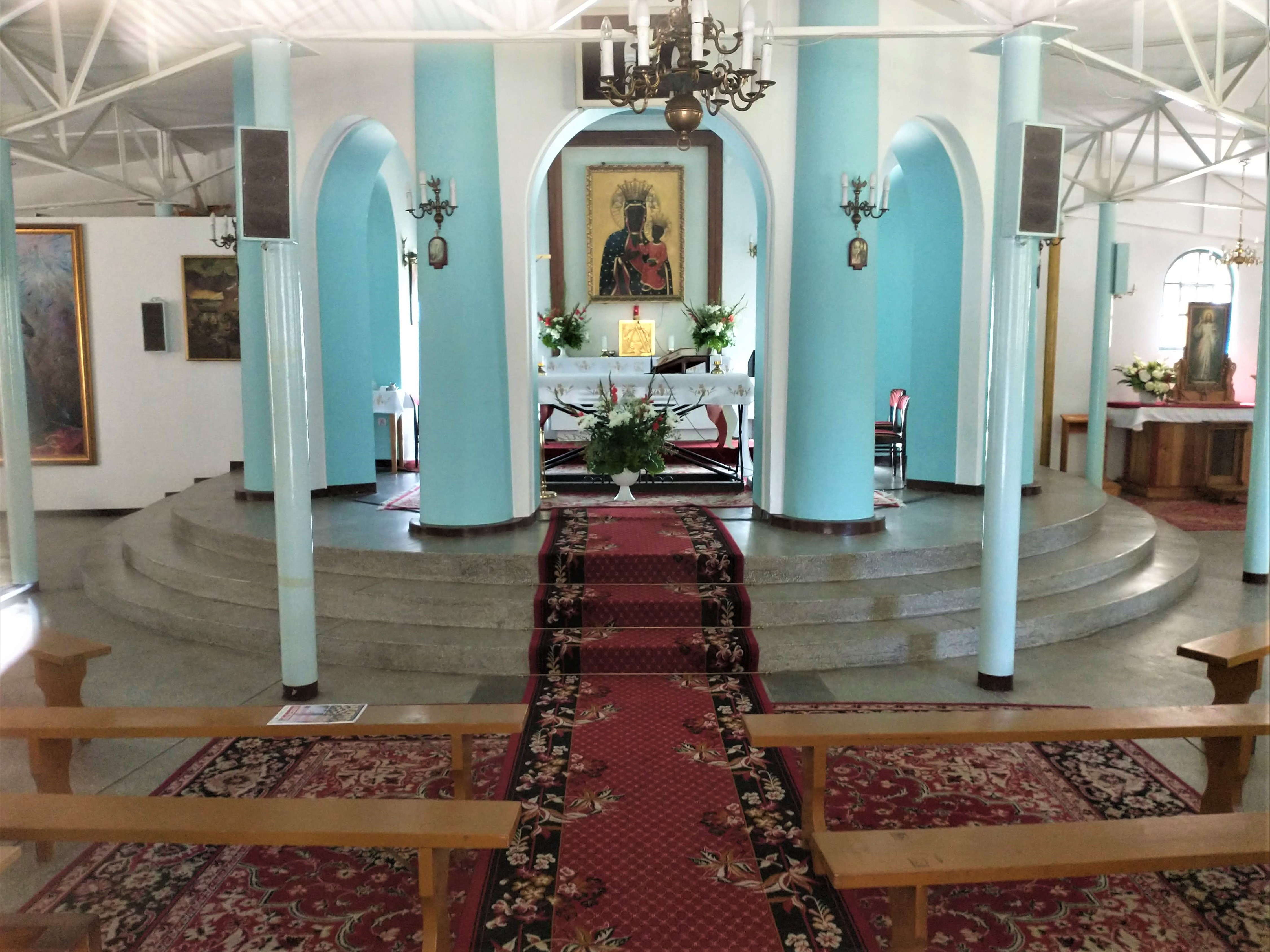 Cmentarz polskich żołnierzy poległych w wojnie z bolszewikami - Ossów.